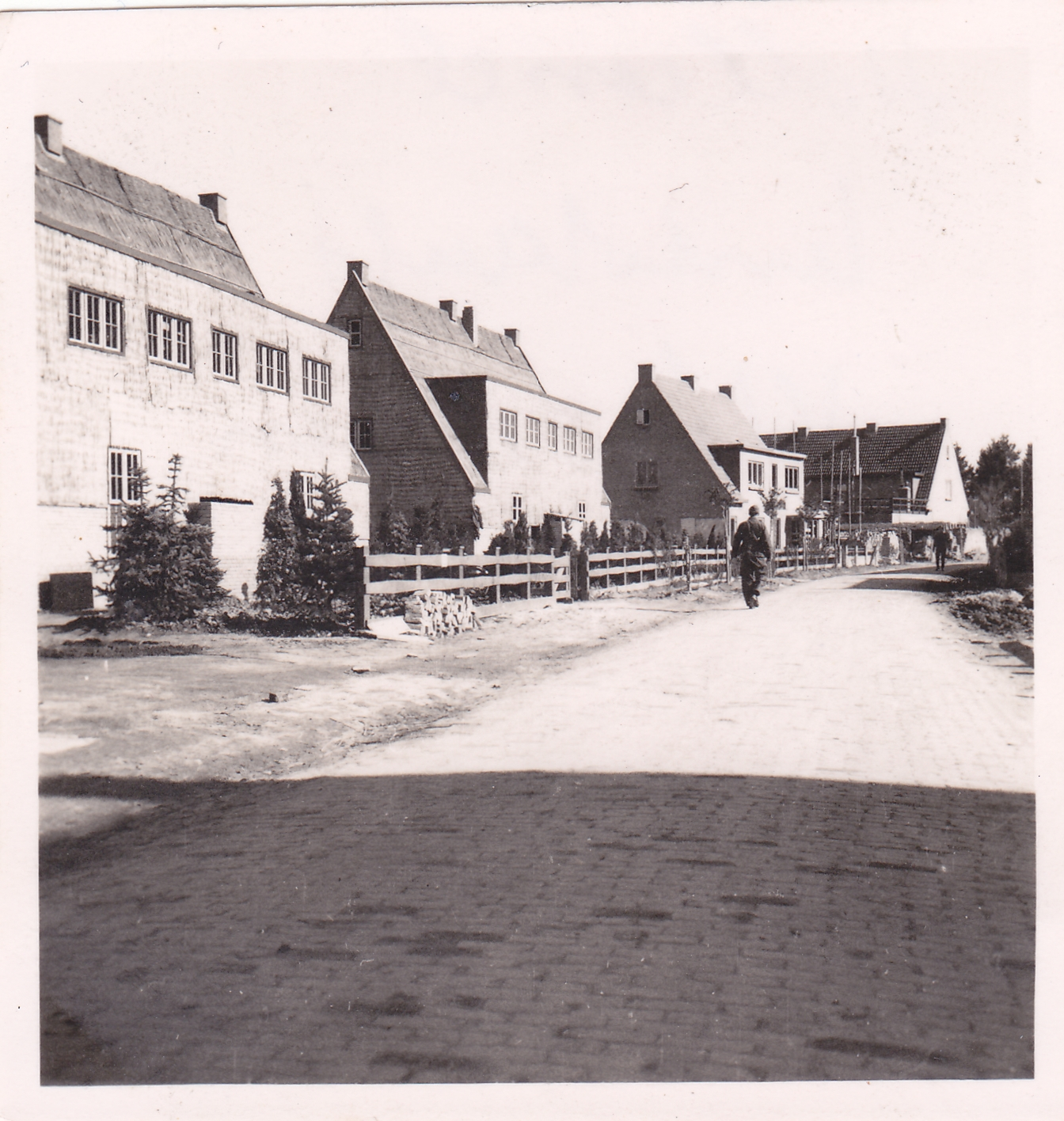 Op vliegveld Vlissingen waren een aantal als woonhuis gecamoufleerde woonbarakken te vinden.